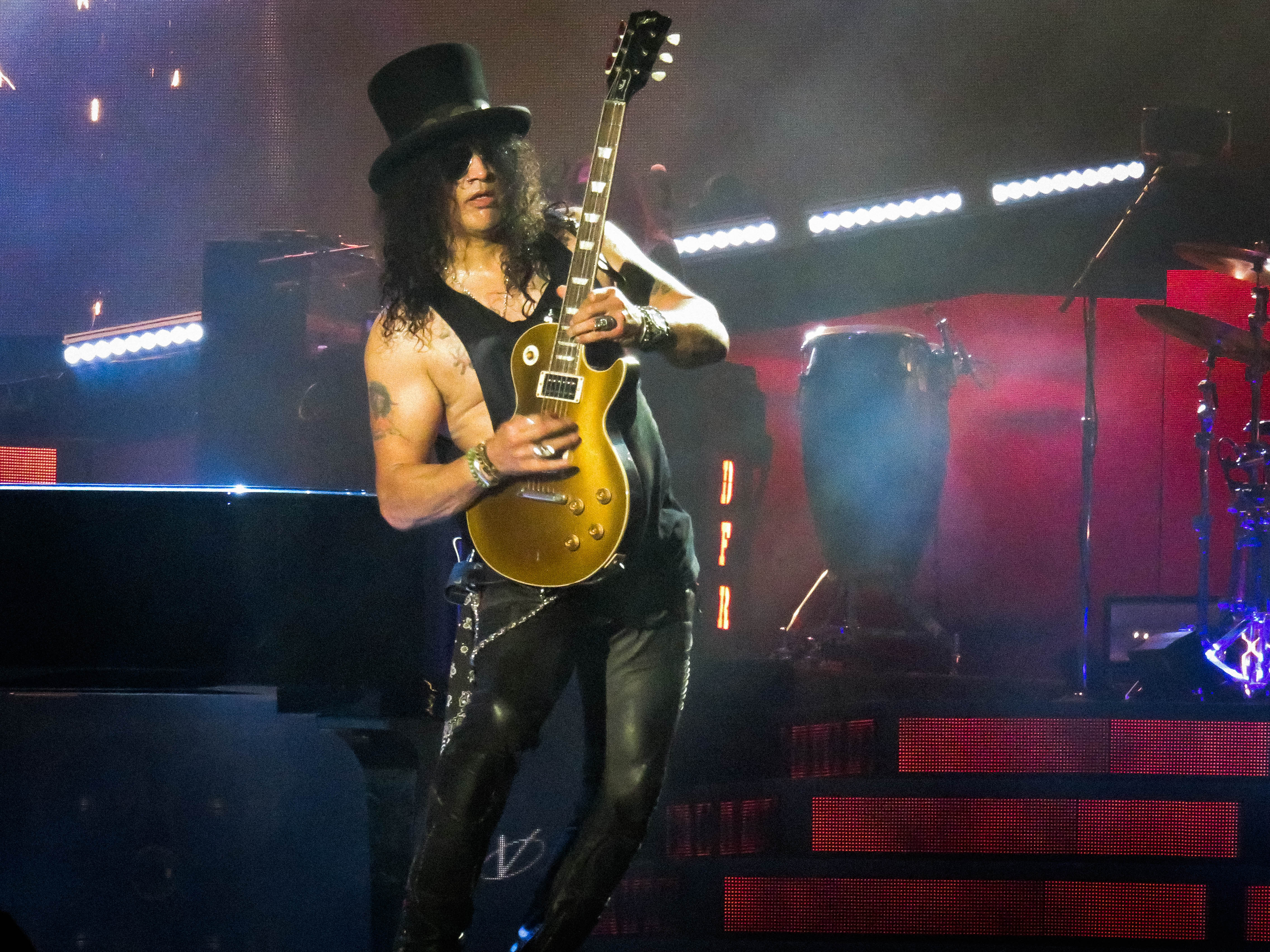 Guns n´Roses Palacio de los Deportes 30/11/2016